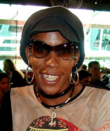 Lacraia em futebol beneficente em 2003.